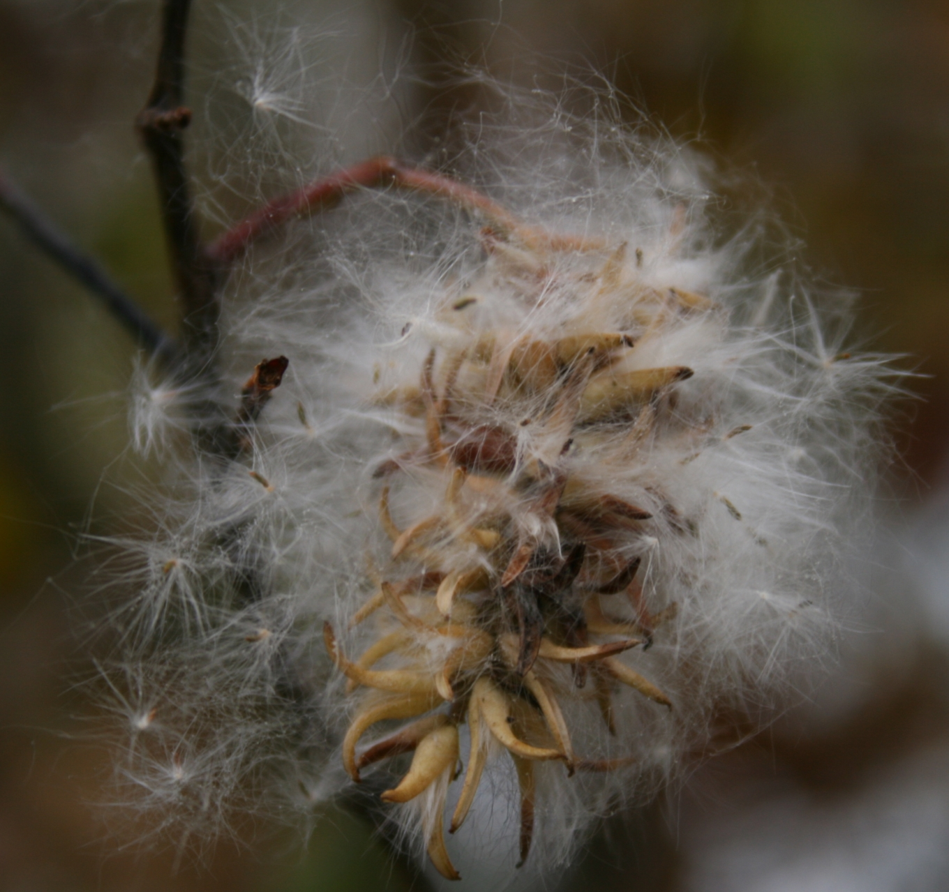 Salix pentandra: Seeds